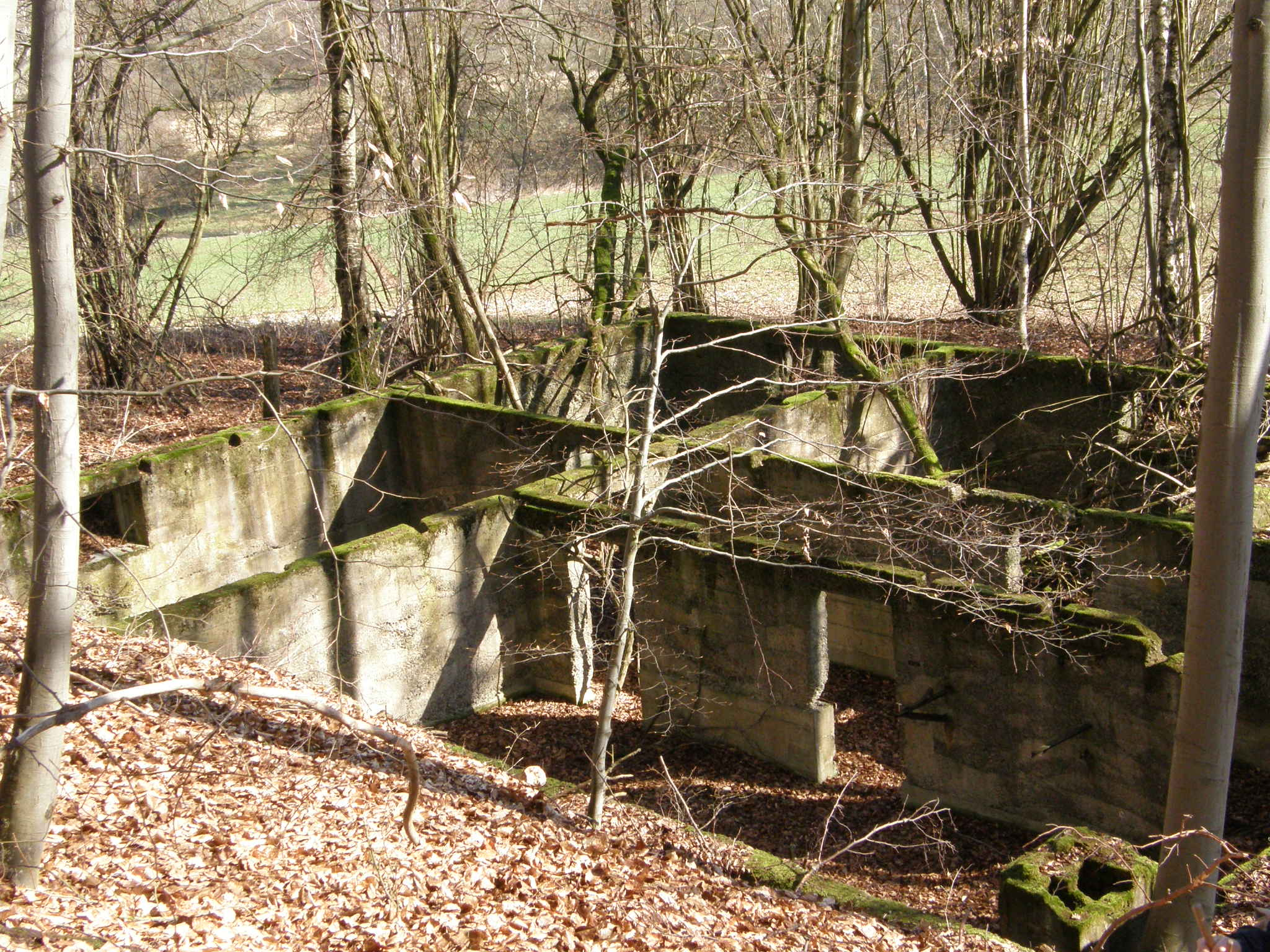 Woffleben, Kriegsruine aus dem II. Weltkrieg – von der Natur erobert